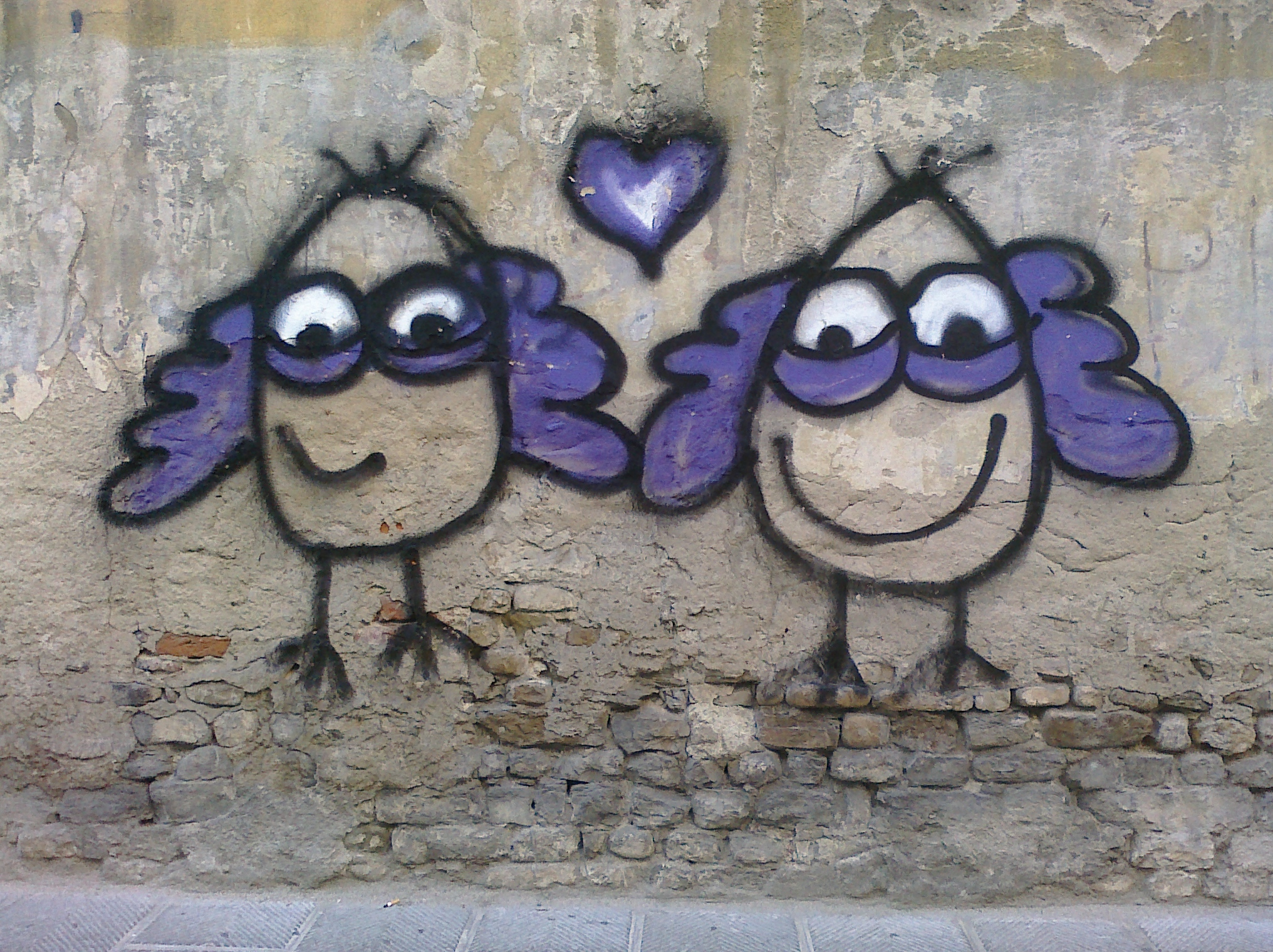 fotografia di un graffito in Via Pier Capponi, Firenze, cancellato dagli imbianchini del Comune dopo pochi giorni.